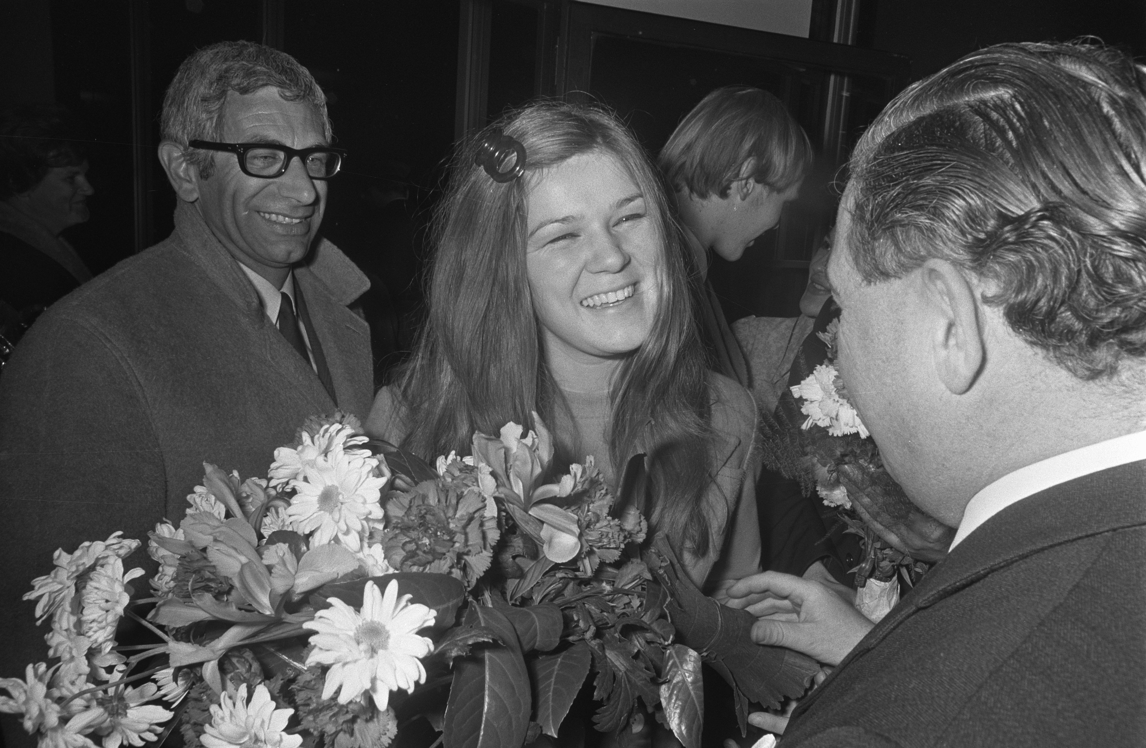 Collectie / Archief : Fotocollectie Anefo Reportage / Serie : [ onbekend ] Beschrijving : Lenny Kuhr arriveert op Schiphol, na op het Eurovisie Songfestival met drie andere deelnemers op de 1e plaats geëindigd te zijn in Madrid; links Frans de Kok Datum : 30 maart 1969 Locatie : Noord-Holland, Schiphol Trefwoorden : deelnemers, songfestivals Persoonsnaam : Kok, Frans de, Kuhr, Lenny Fotograaf : Evers, Joost / Anefo Auteursrechthebbende : Nationaal Archief Materiaalsoort : Negatief (zwart/wit) Nummer archiefinventaris : bekijk toegang 2.24.01.05 Bestanddeelnummer : 922-2484